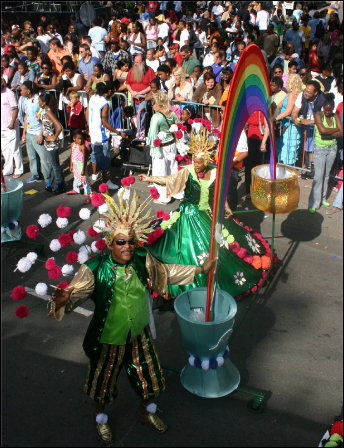 Zomercarnaval in Rotterdam. Het zomercarnaval is een op de Antilliaanse bevolking in Nederland (en vooral Rotterdam) gericht festival.